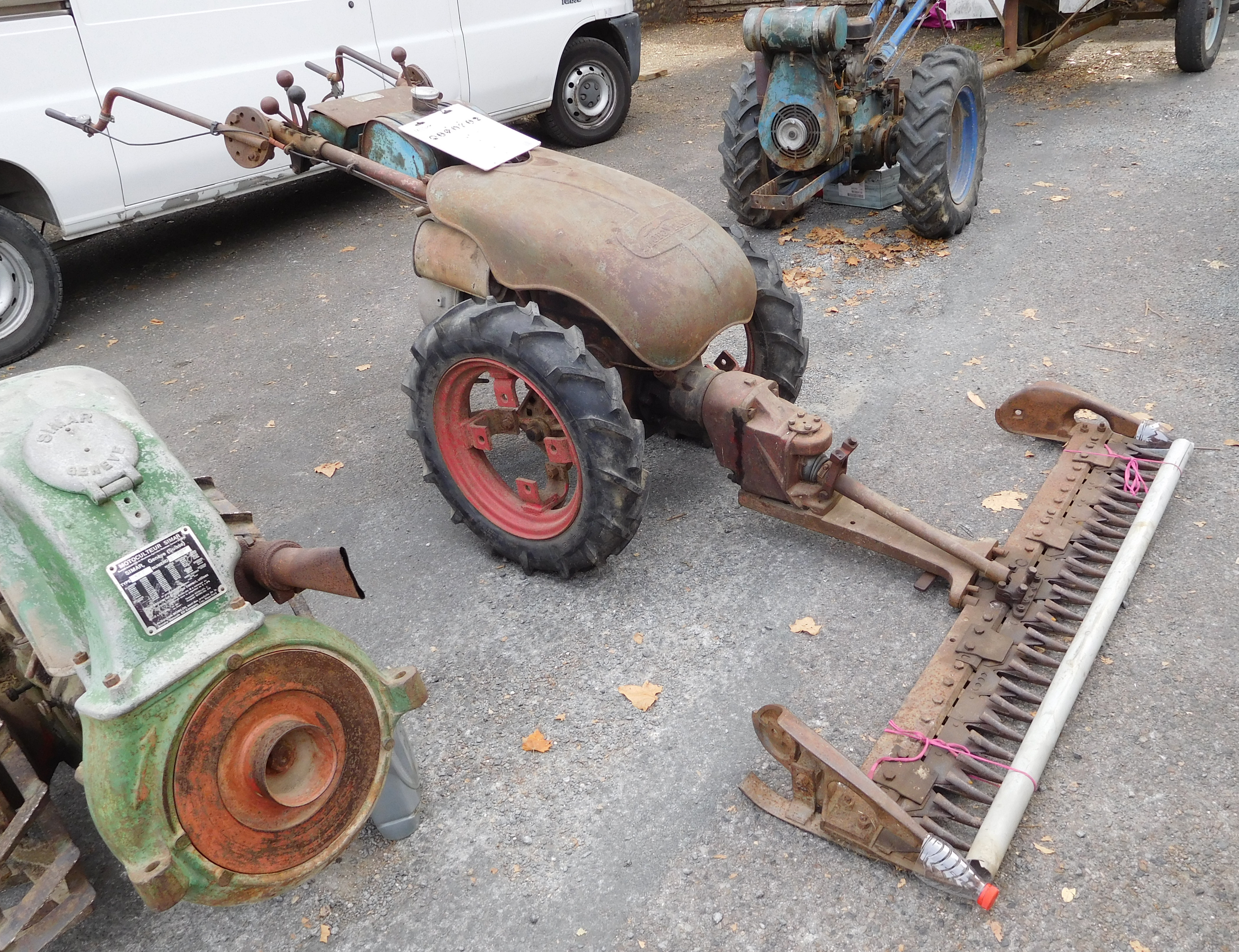 Motofaucheuse Motostandard (au centre).